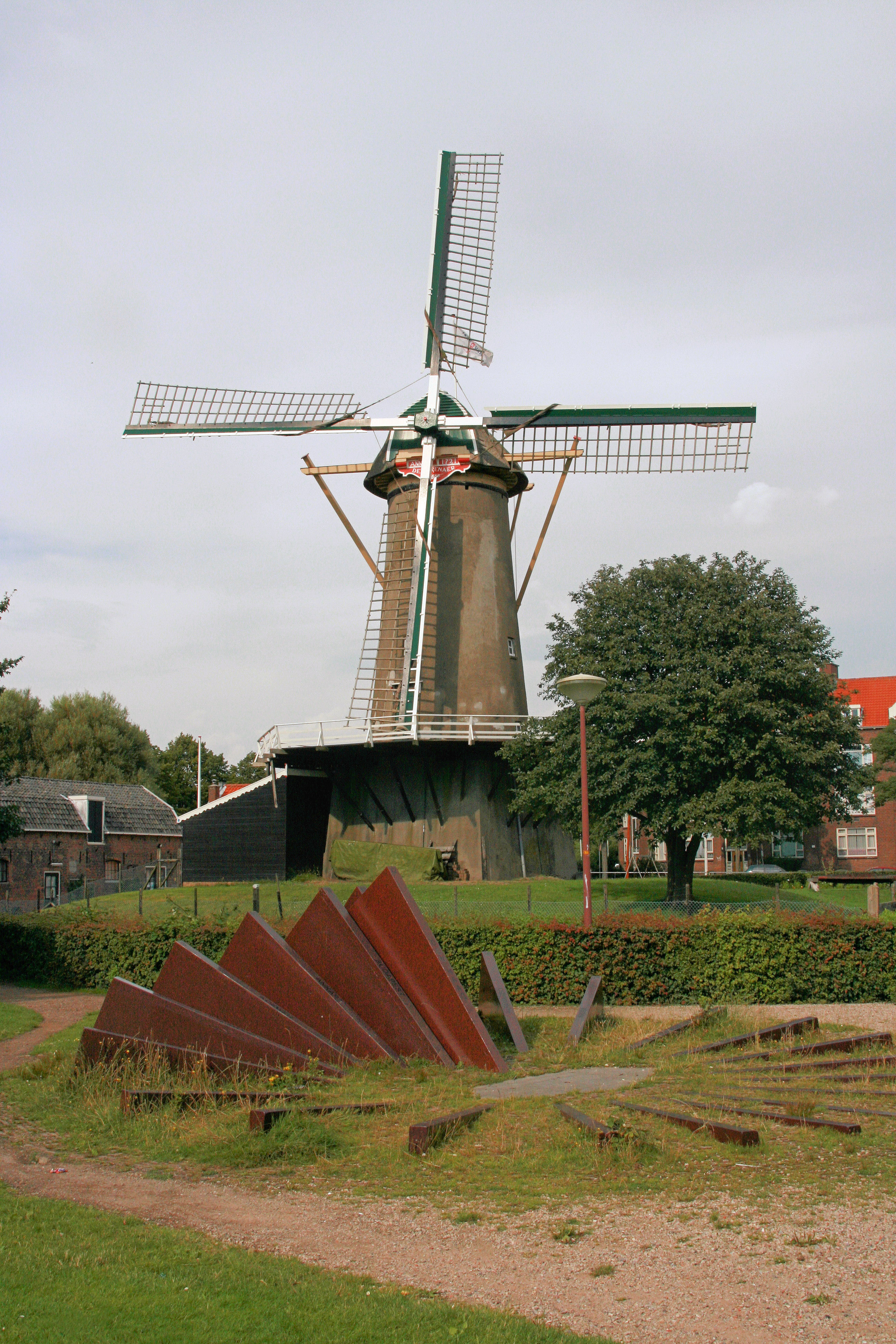 Molen en zonnewijzer in Loosduinen